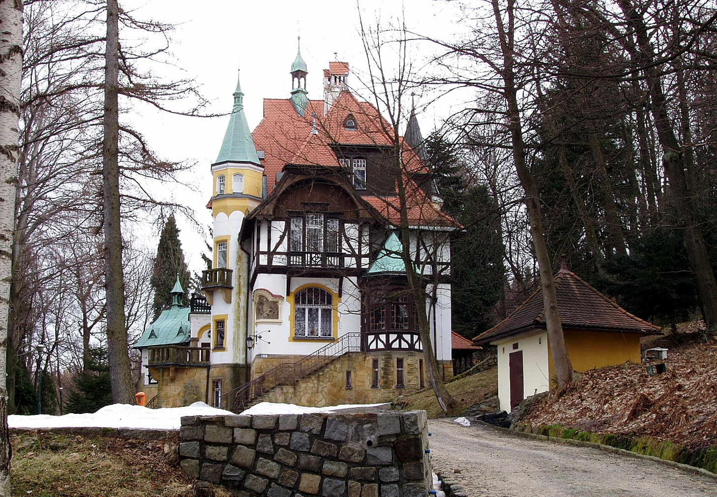 Świeradów-Zdrój, willa PINTSCH, ob. dom wypoczynkowy MARZENIE I, 1901